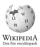 Wikipedia logo 2.0 (da)